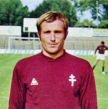 Gérard Hausser (1970, FC Metz), 'Ageducatifs 1970 - 1971', Panini figurina n°110.